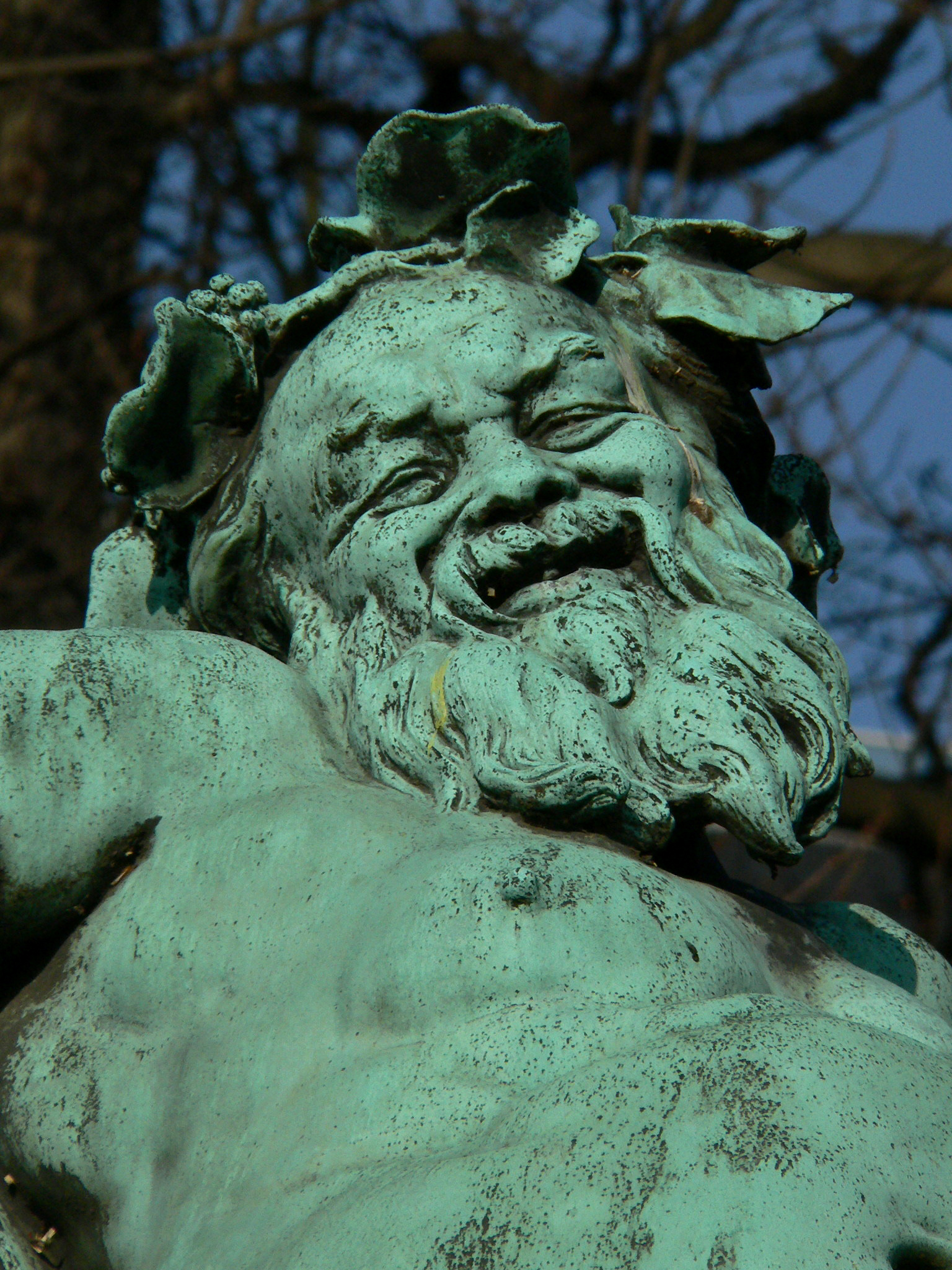 Le triomphe de Silène Sculpteur: Aimé-Jules Dalou Jardin du Luxembourg, Paris Photographe: Clio20 (2006)